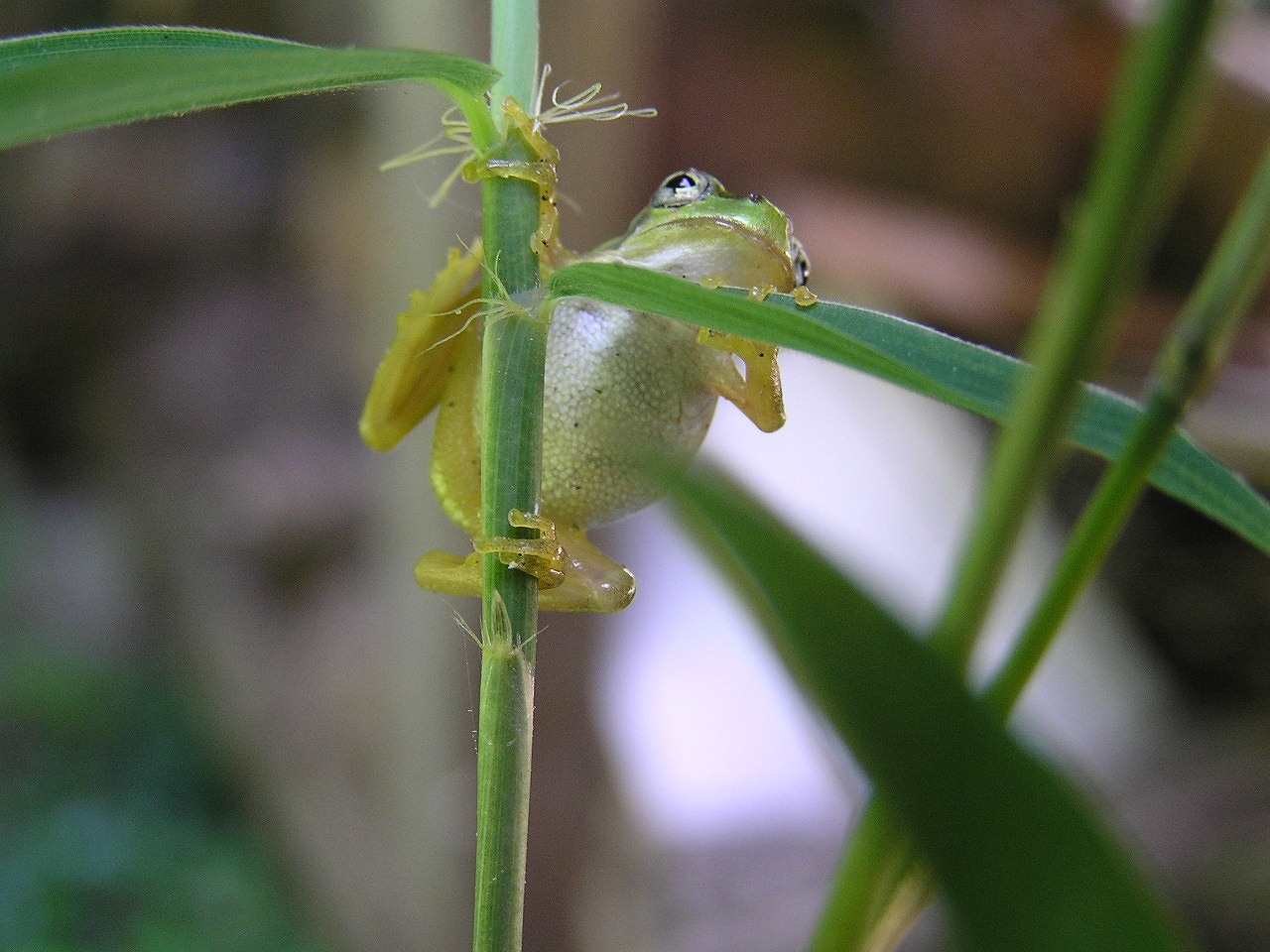 孟宗竹に止まるアマガエル